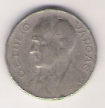 Verso de uma moeda de 100 Réis cunhada em 1940. This graphic was created with GIMP.